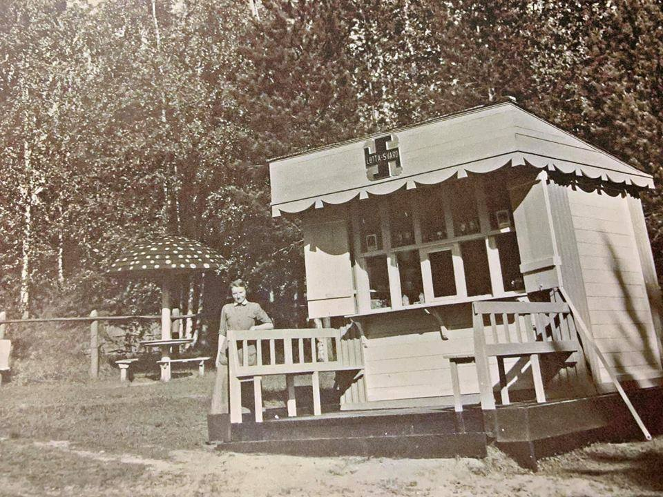 Punkaharjun aseman Lottakioski 1930 luvulla. Kuvan ottanut asemapäällikkö Teodor Sunell.